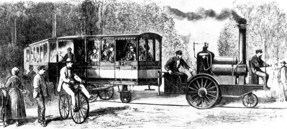 Le monorail Larmanjat, exploité en 1868 sur le tramway du Raincy à Montfermeil. Le principe du rail central guidant les véhicules roulant sur la chaussée existante ne s’est pas avéré concluant dans cette réalisation, de même que dans les réalisations plus récentes de trolleybus guidés à Nancy ou Caen. Catégorie:Le Raincy Catégorie:Montfermeil